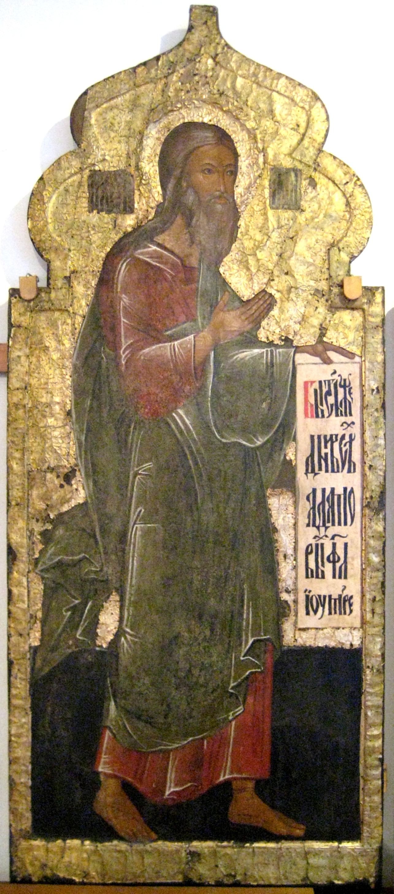 Адам. Праотеческий ряд. 1630 год. Ждан Дементьев, Вологда. Собор Успения Богородицы, Кирилло-Белозерский монастырь. Музей Кирилло-Белозерского монастыря